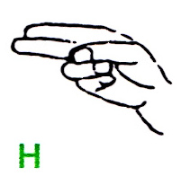 Buchstabe H im deutschen Fingeralphabet, gemäß einer Infokarte der Deutschen Gehörlosenhilfe Bayern e.V